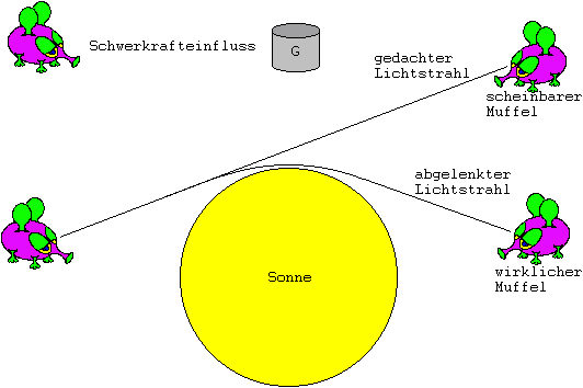 Schwerkrafteinfluss auf Licht. Nach Einstein lenkt die Schwerkraft auch Licht ab. Das konnte experimentell bei einer Sonnenfinsternis nachgewiesen werden.